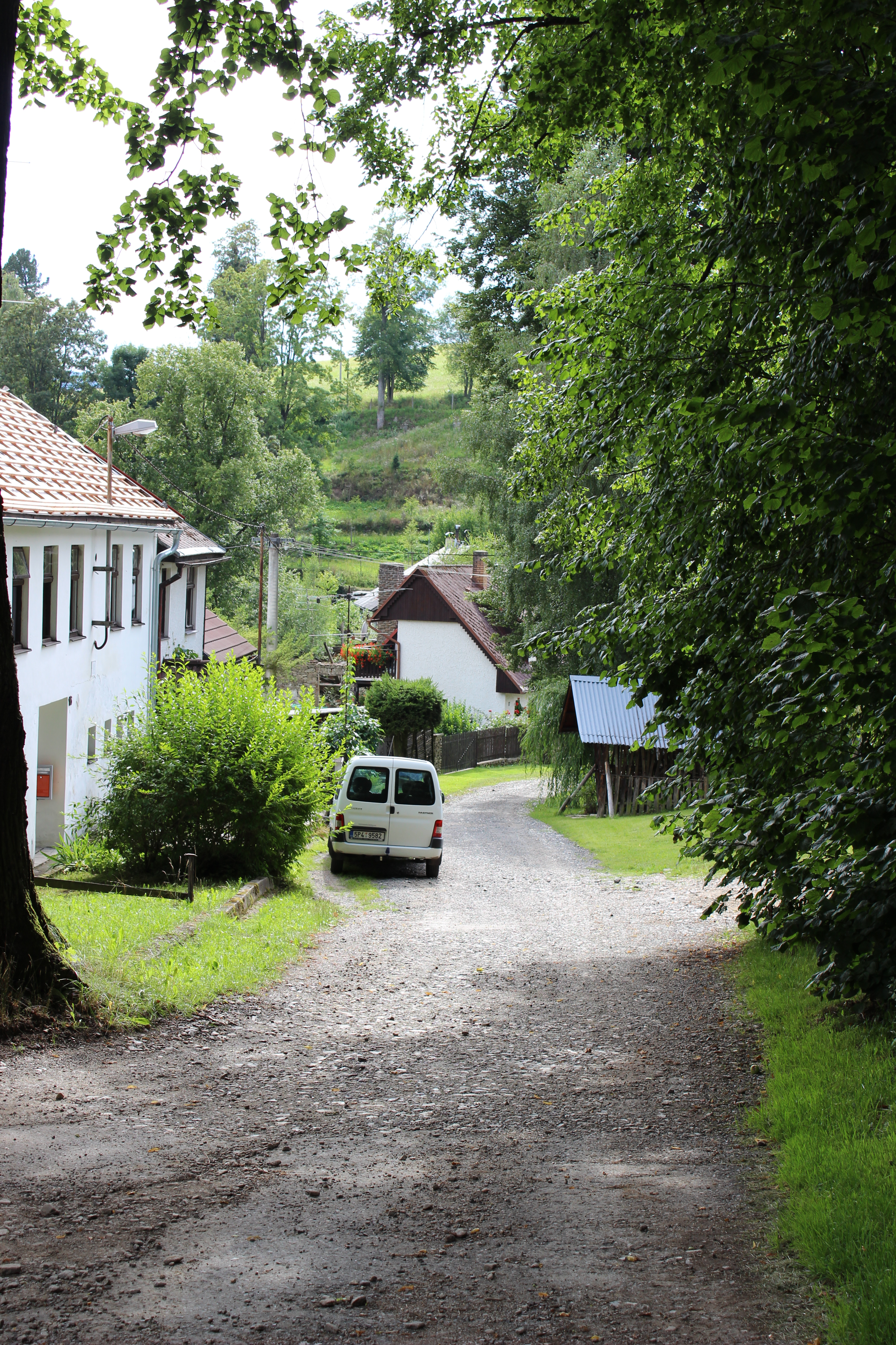 Zástavba v Dolejším Krušci (pohled z aleje).